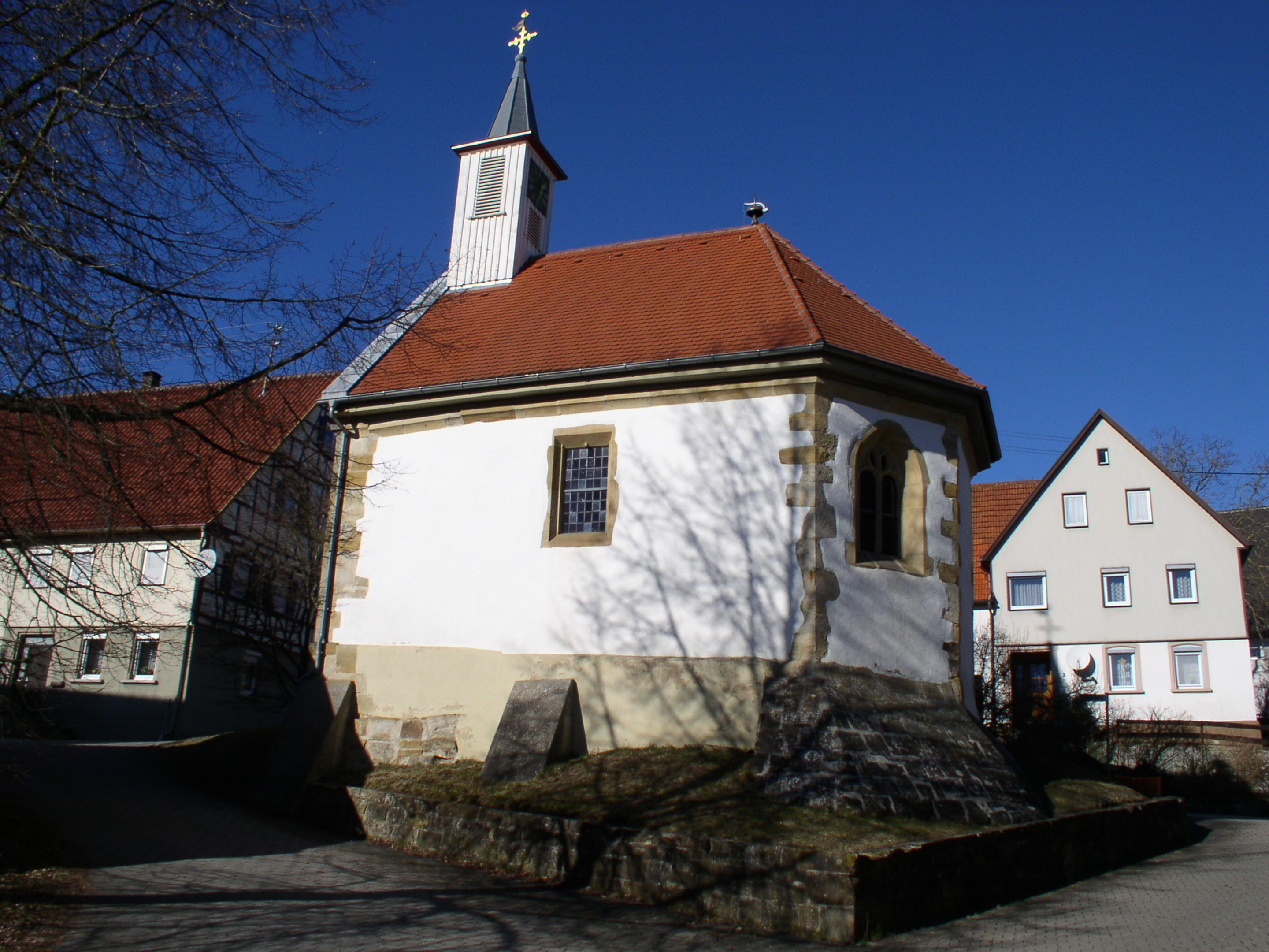 Nikolaus-Kapelle (Käppele), Ruppertshofen, Deutschland